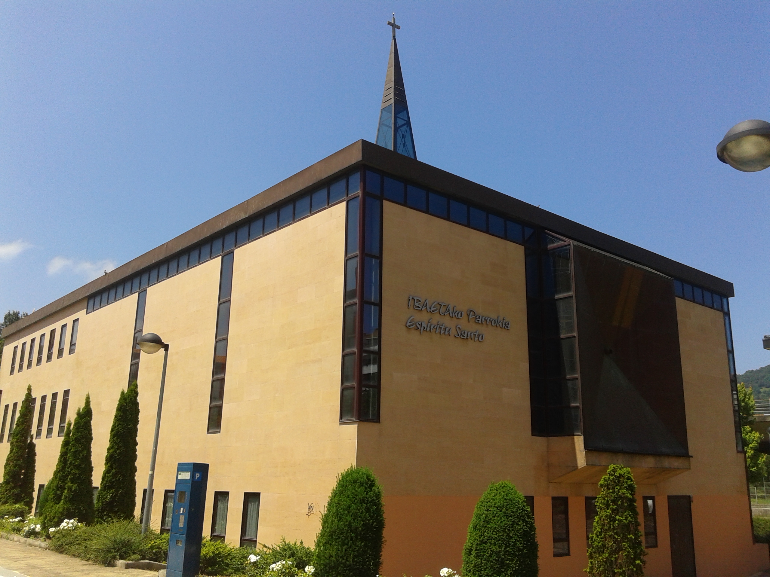 Espiritu Santuaren eliza Donostiako Ibaeta auzoan.